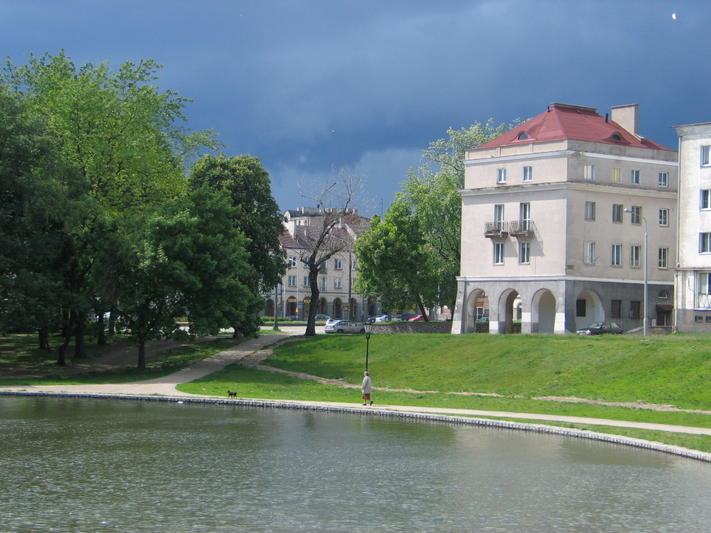 Stare Miasto nad stawem na rzece Łódce w Łodzi